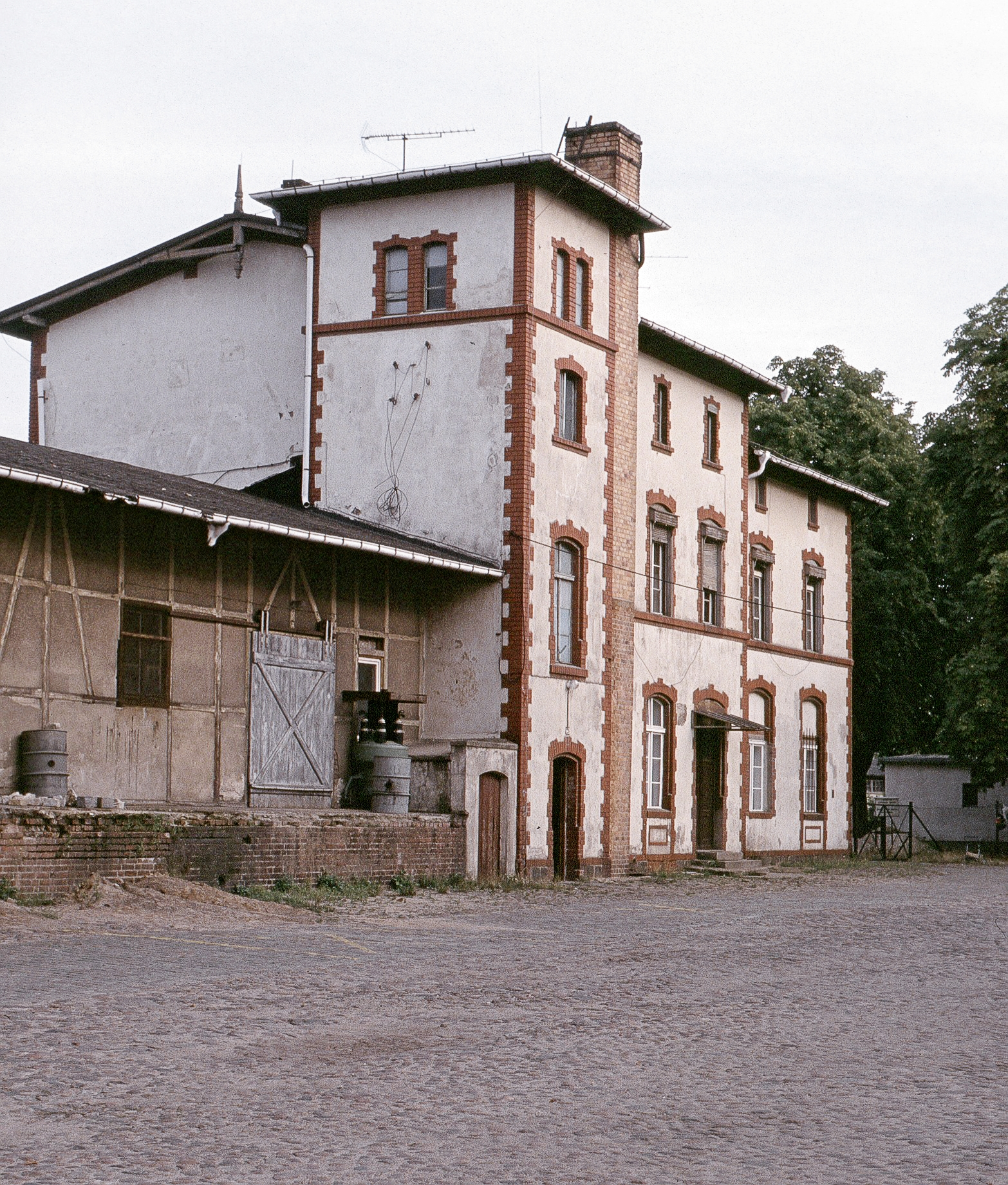 Stadtbahnhof der Strausberger Eisenbahn